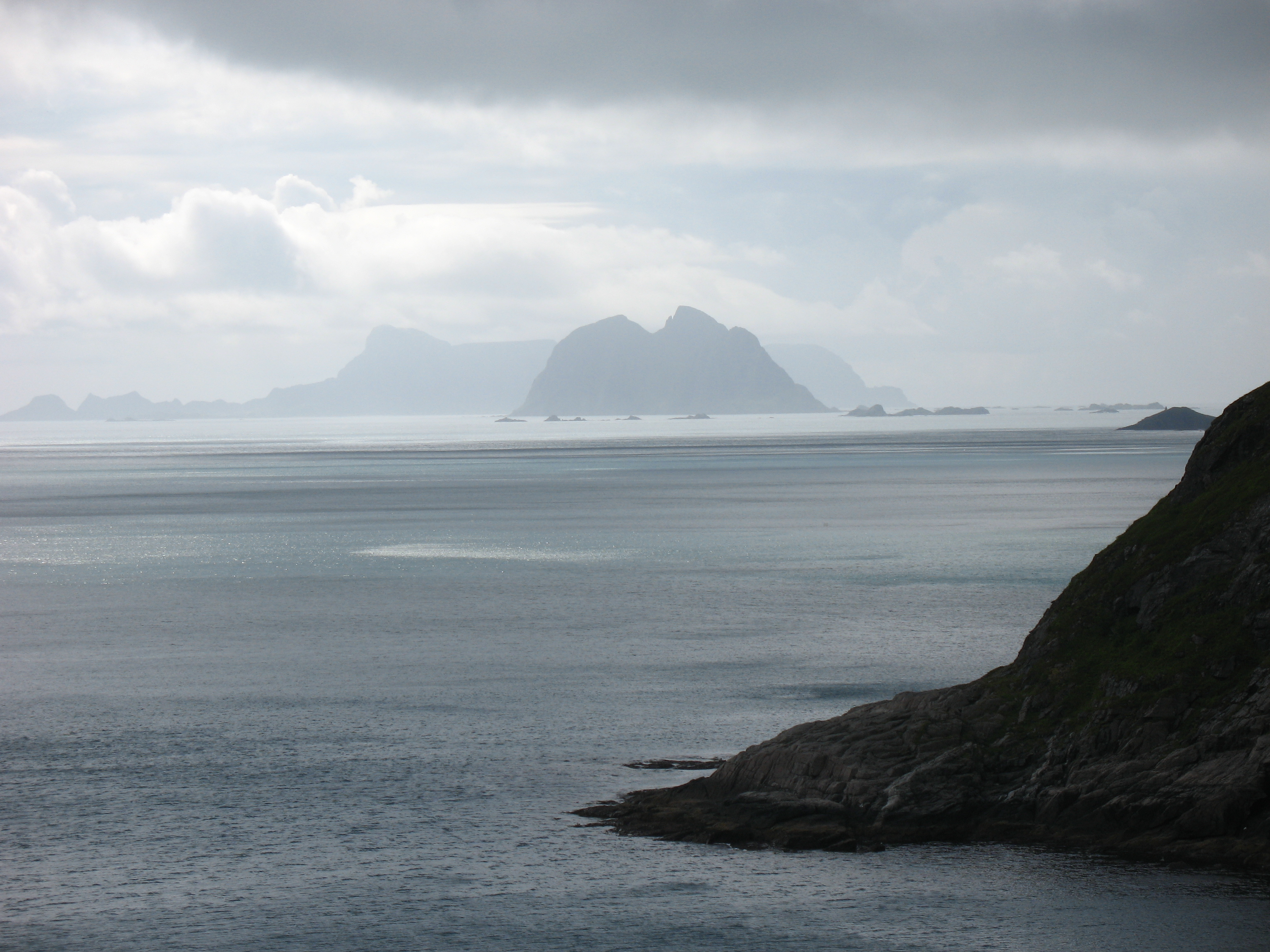 Blick von den Lofoten aus Richtung Mosken und Værøy (ganz im Hintergrund).